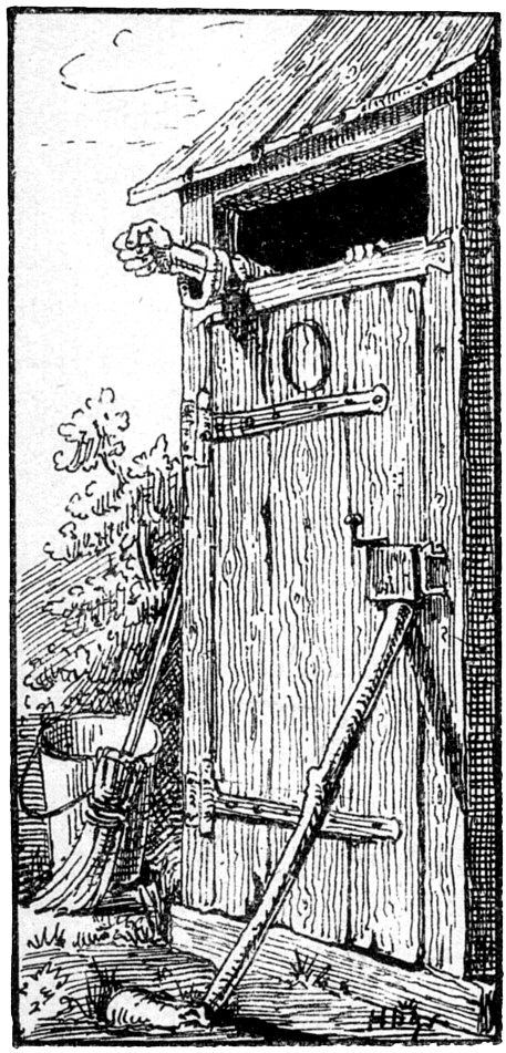 Illustration zu Sebastian Sailers Der Fall Luzifers